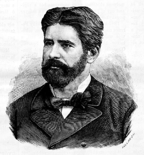 Hampel József (1849–1913) régész, egyetemi tanár, a Magyar Tudományos Akadémia rendes tagja portréja. Pollák Zsigmond metszete